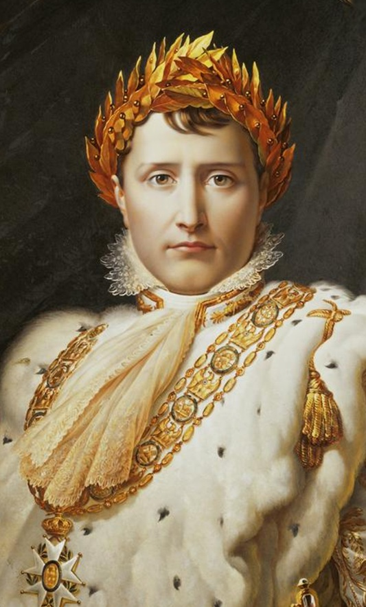 Emperor Napoleon of the French